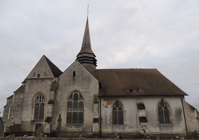 Église Saint-Loup, côté Nord avecles grandes baies de vitraux à arcades gravées, le transept et le clocher